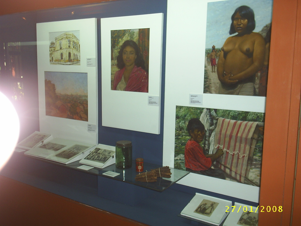 Pinturas y objetos varios